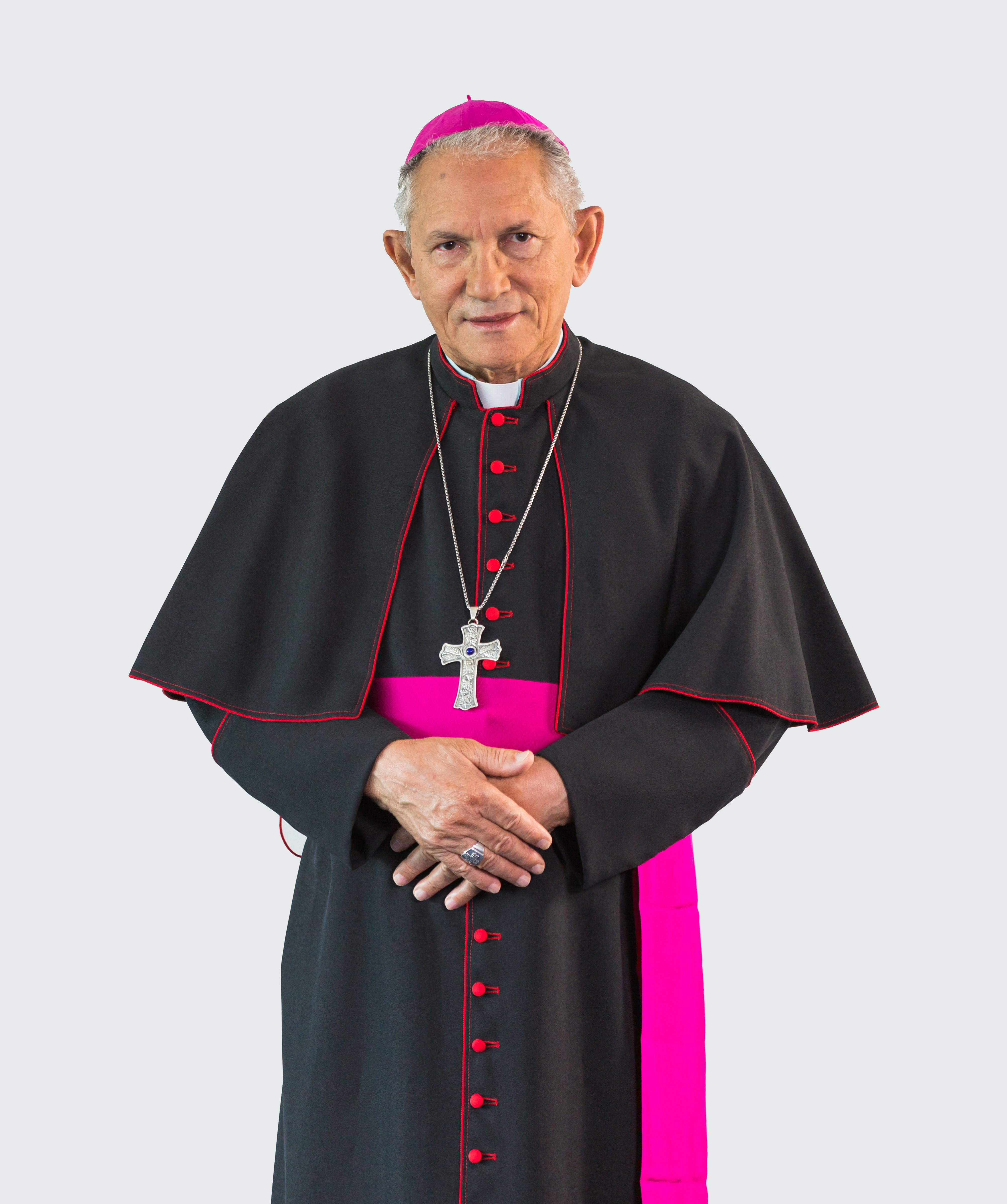 Obispo Valentin Reynoso Hidalgo